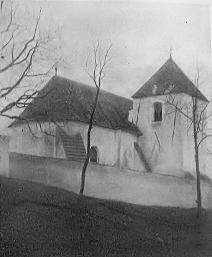 Kostel svatého Petra a Pavla Podbřežice (Vyškov- Czech republic)